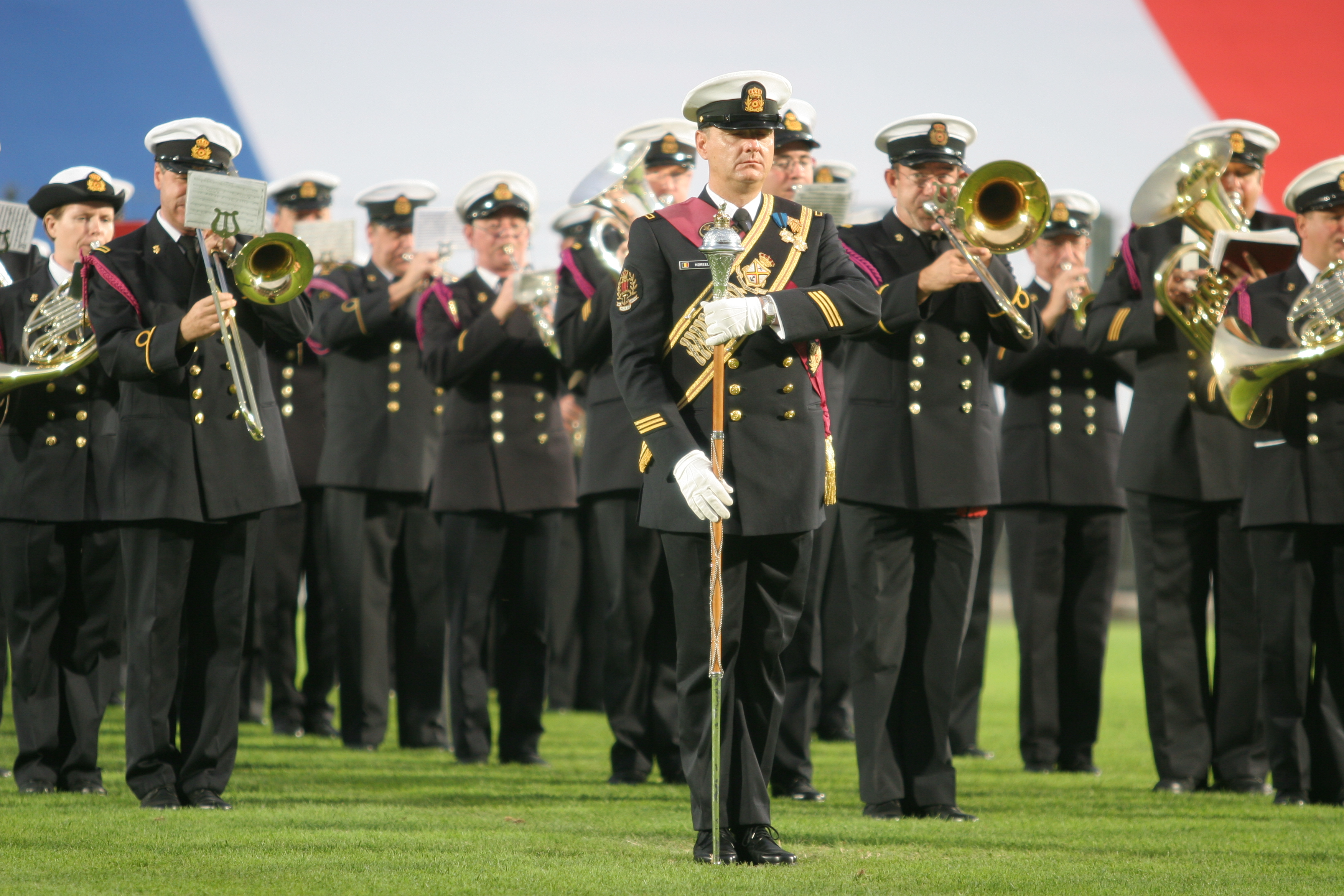 Musique royale de la Marine belge lors du festival de musiques militaires de Nice le 6 octobre 2007